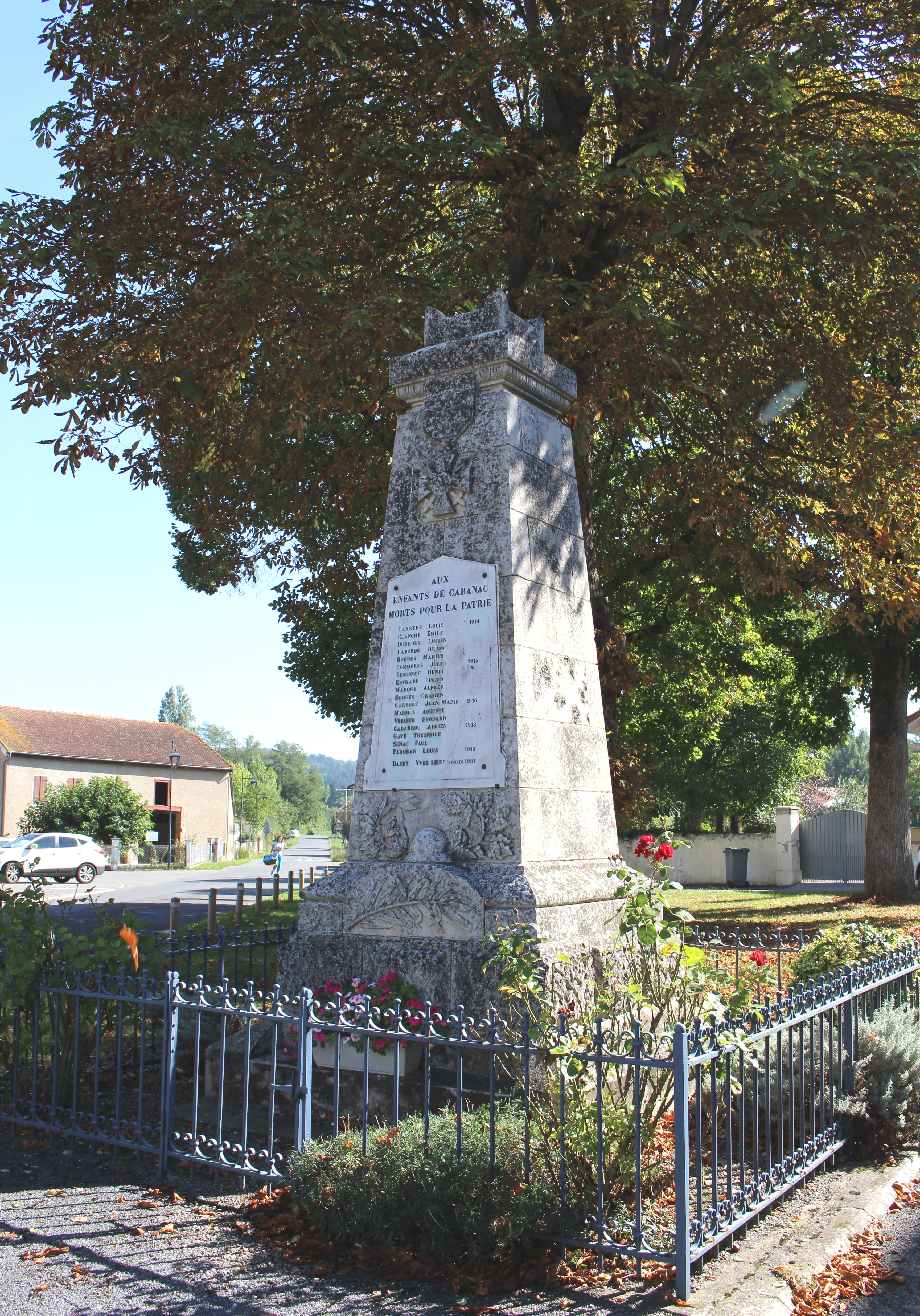 Monument aux morts de Cabanac (Hautes-Pyrénées)